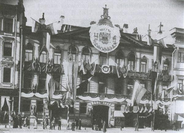 Nevsky Prospekt